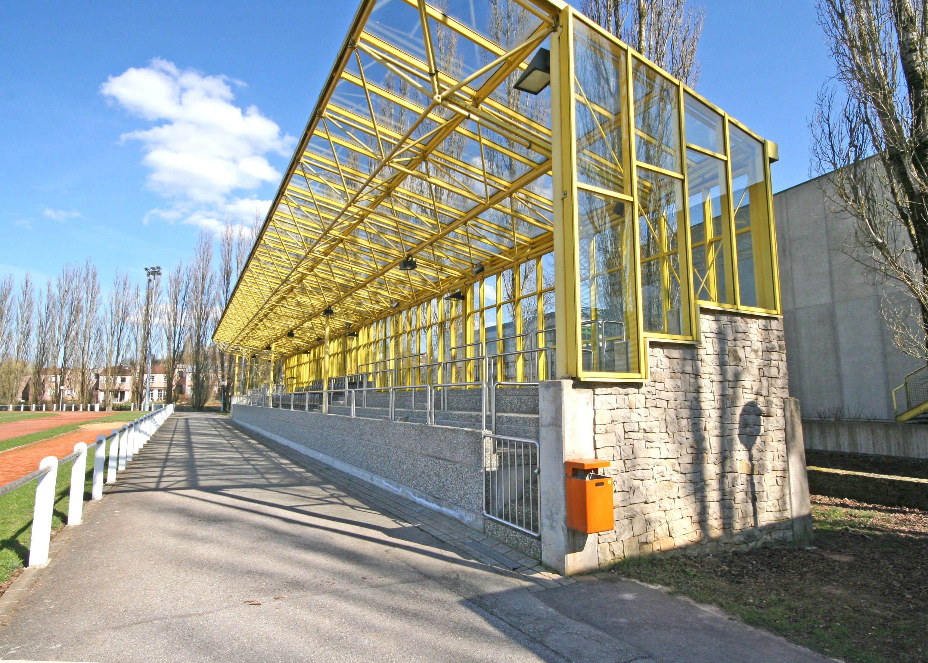 Tribün vum F.C. Mamer 32.